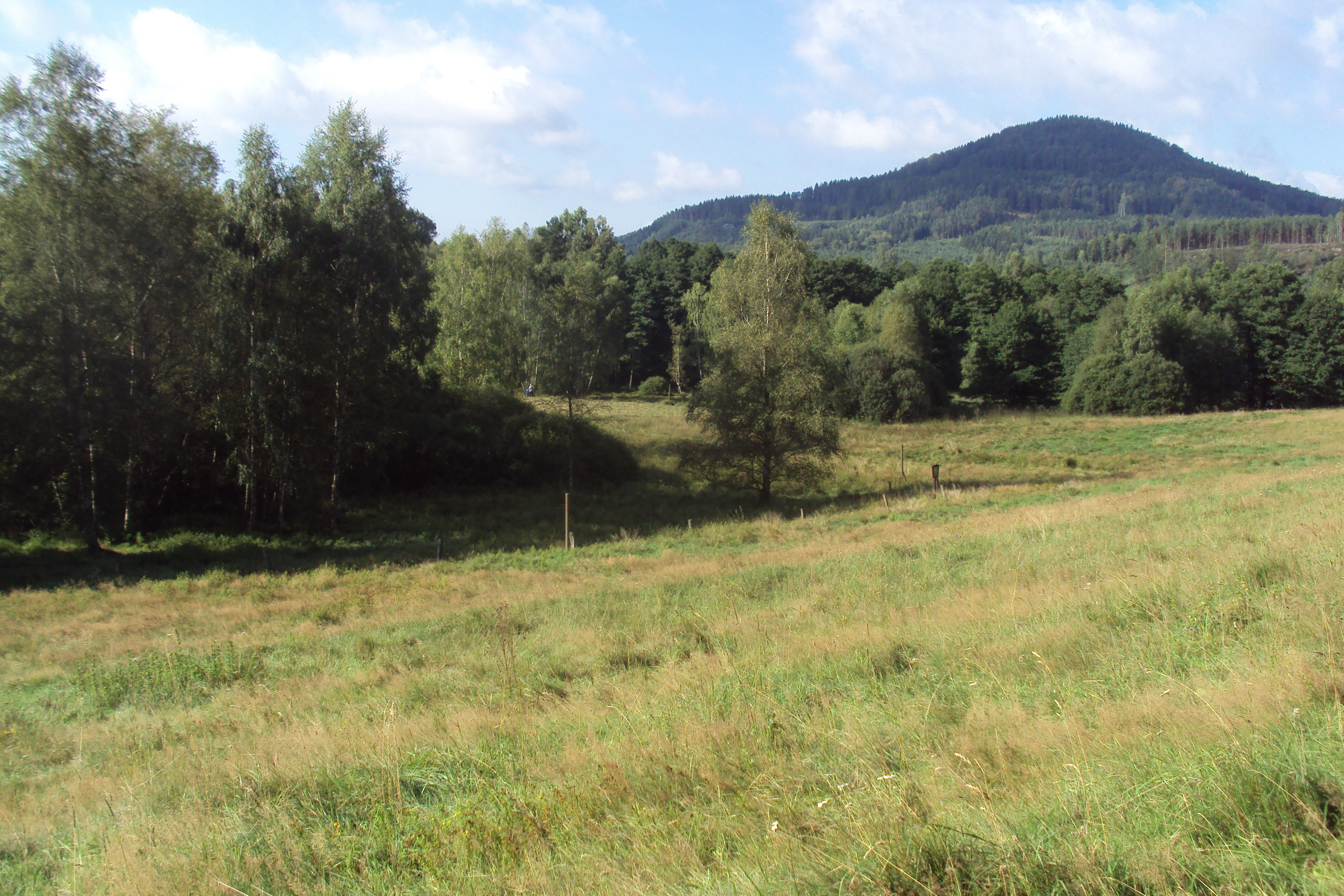 Přírodní rezervace Rašeliniště Mařeničky shora od cesty, vzadu asi Trávnický vrch v Lužických horách